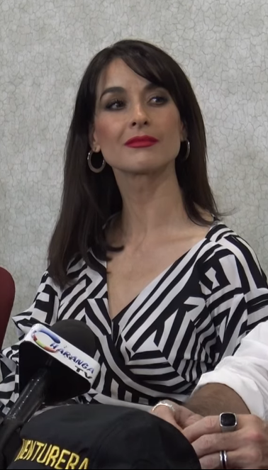 ¿Carmen Salinas es amiga de los papás de Donald Trump? regañan a Edith González x enseñar calzones